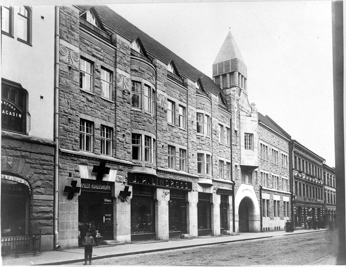 1900-luvun alussa otetussa valokuvassa näkyy Tampereen Kauppakatu 4:ssä sijaitseva ns. Osuuspankin talo. Siinä toimi alun perin Kansallis-Osake-Pankki. Rakennuksen suunnitteli Vilho Penttilä vuonna 1905. Kansallisromanttiseen julkisivuun kuulunut torni tuhoutui talvisodassa, eikä sitä enää sen jälkeen rakennettu uudelleen. Taloa on korotettu 1950-luvulla.